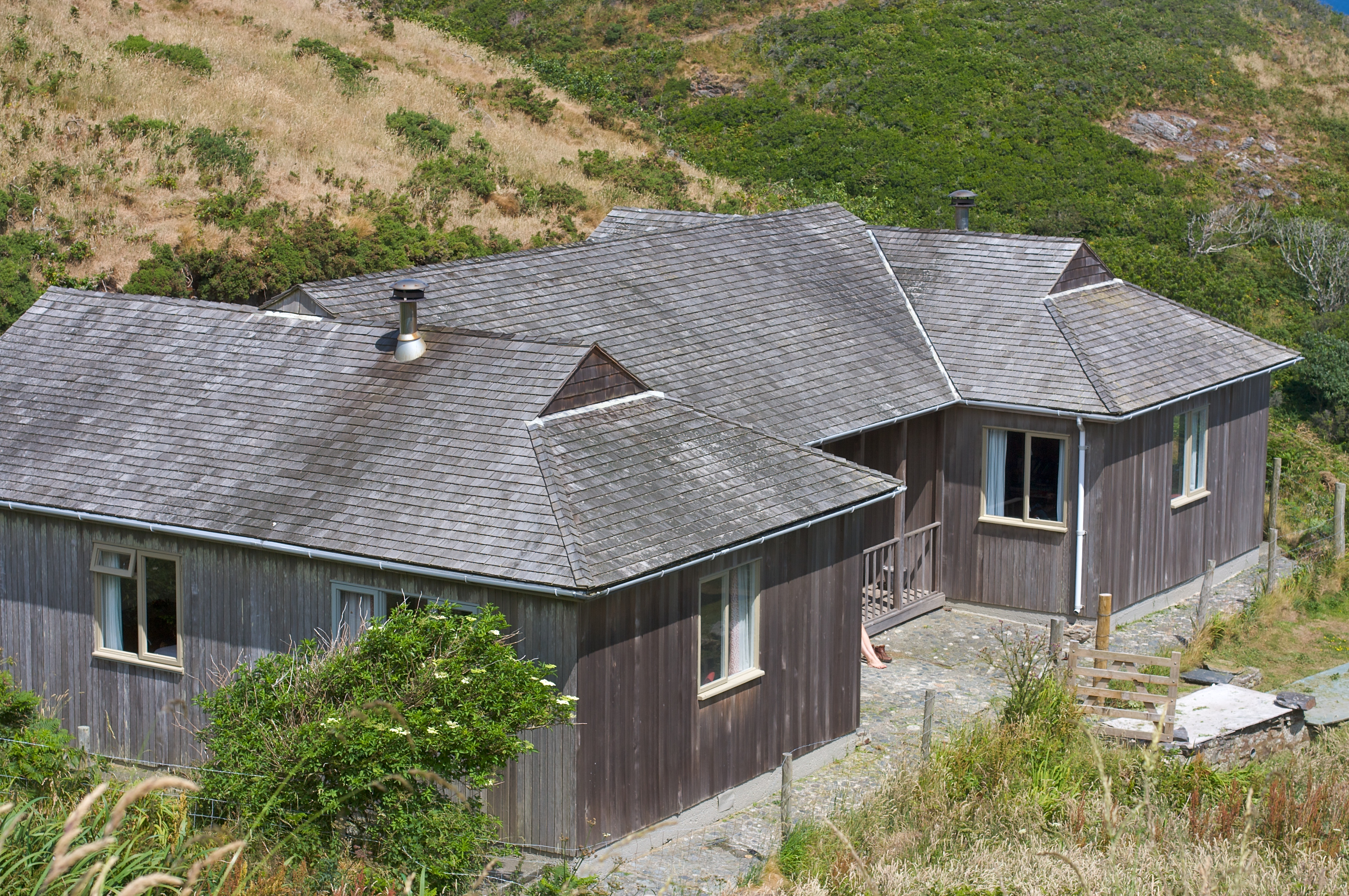 Bramble Villa